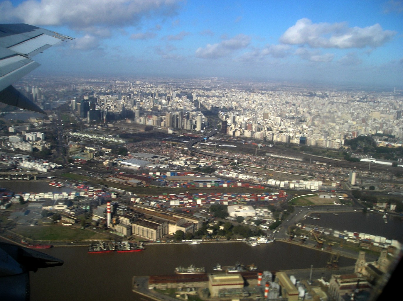 Buenos Aires (vista aérea). Puerto, Retiro, Av. 9 de Julio. Argentina.